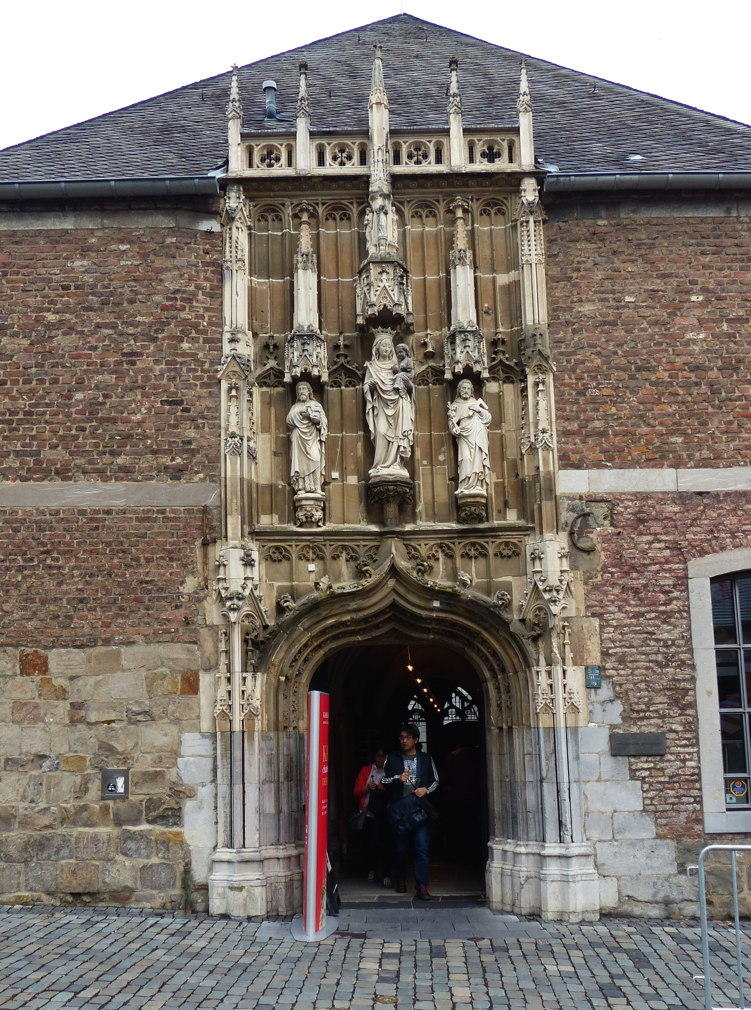 Kleines Drachenloch, Eingang zur Domschatzkammer